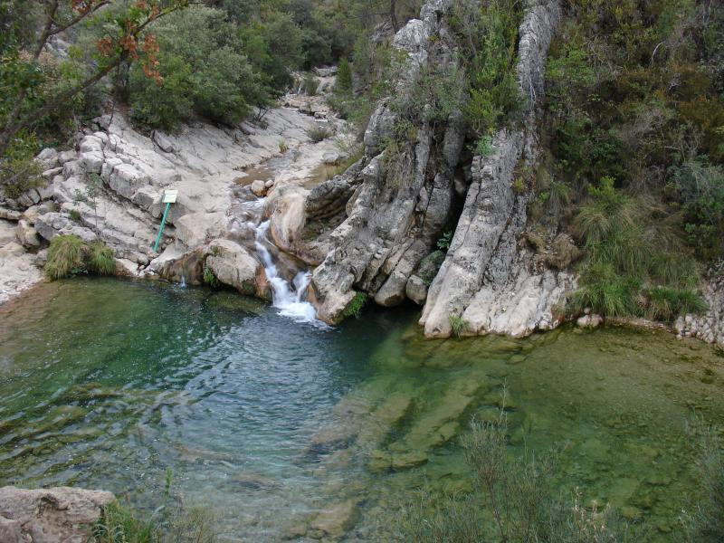 El arroyo de las Truchas vierte su agua en el río Borosa a la altura del Charco de la Gracea